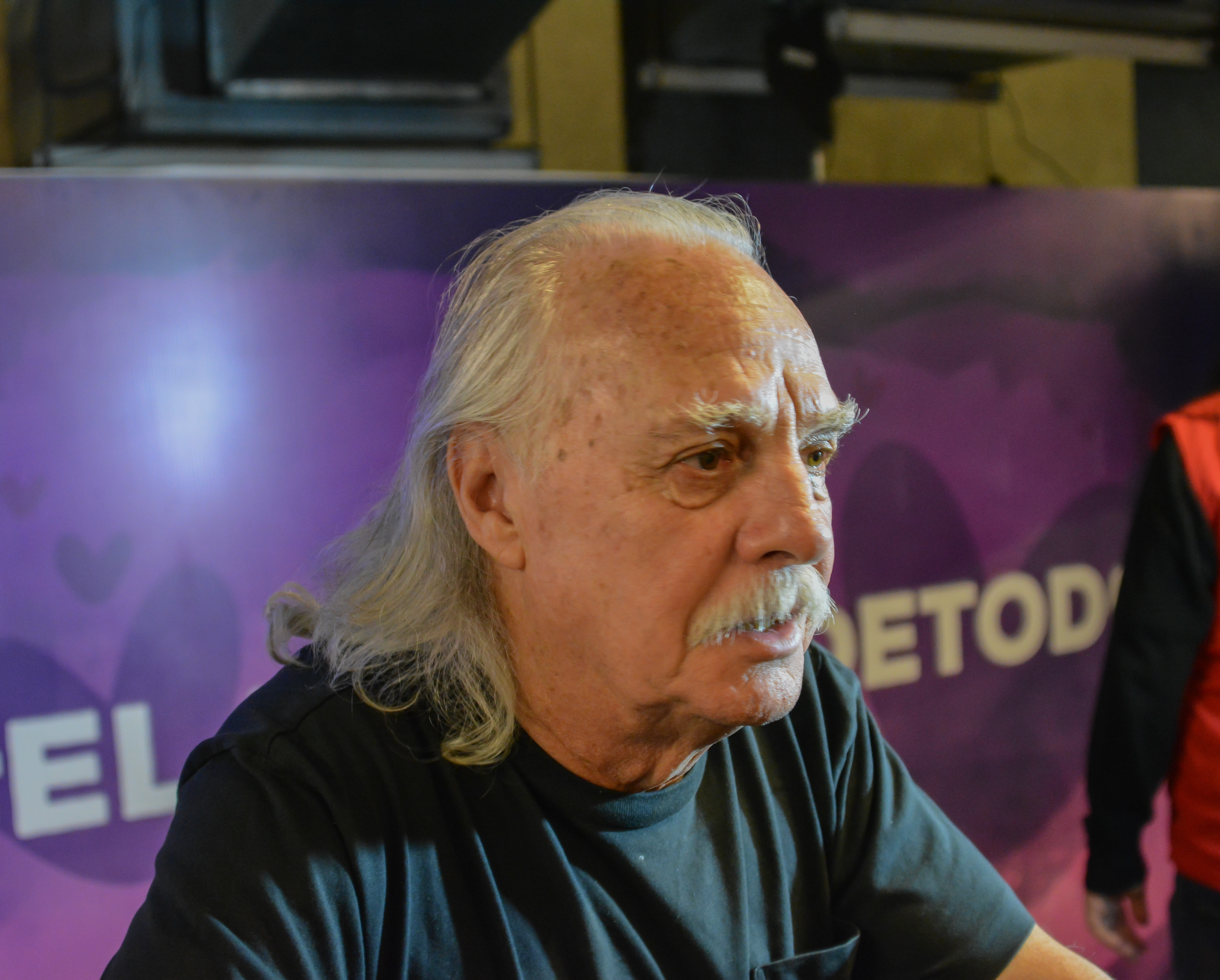 Teletón 2017